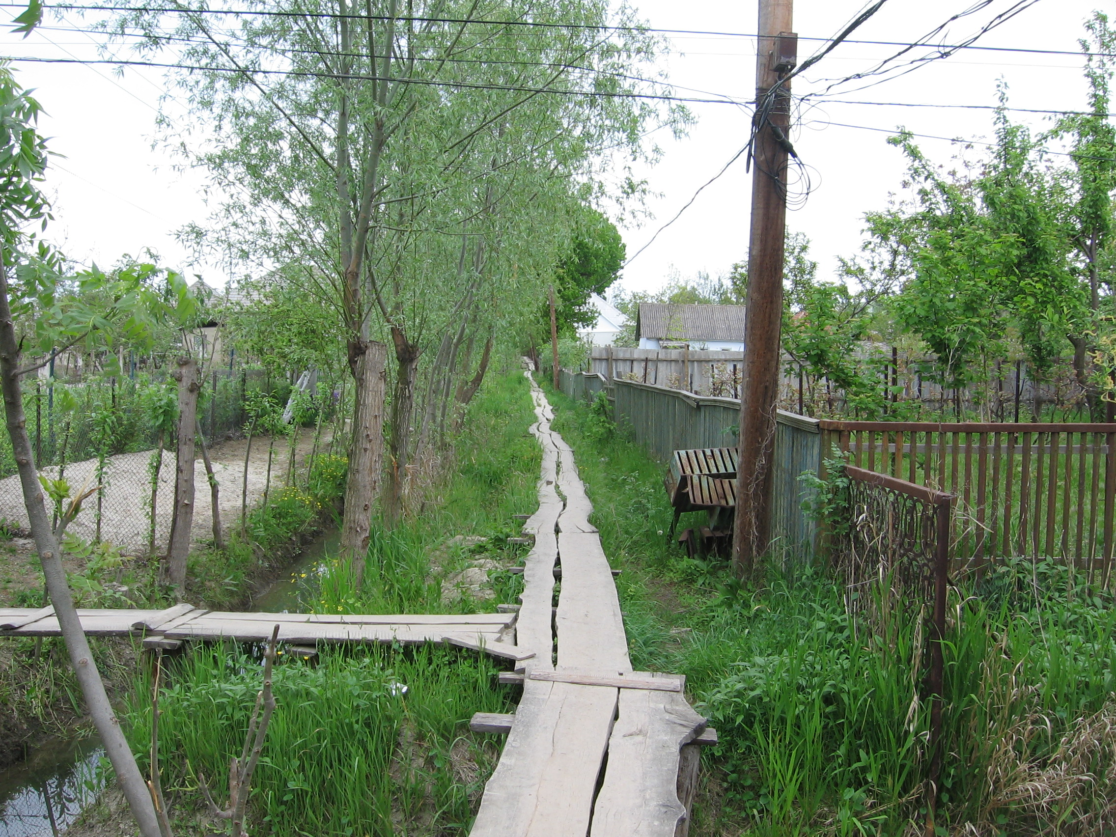 A view of Vilkovo, Ukraine, 2007